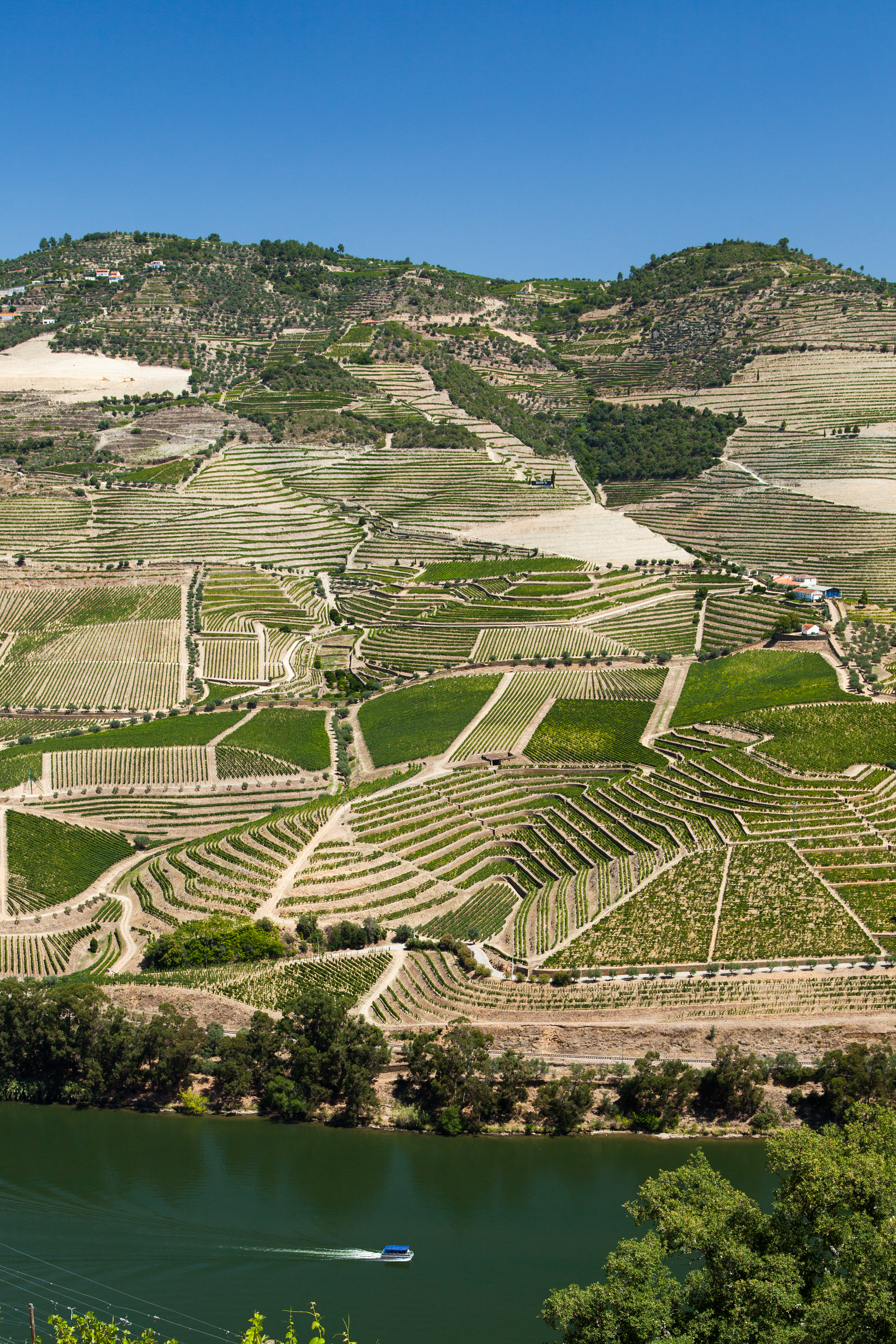 The Douro (Portuguese: Douro [ˈdowɾu, ˈdoɾu]